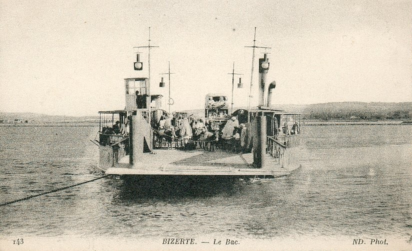 Le bac de Bizerte, Tunisia